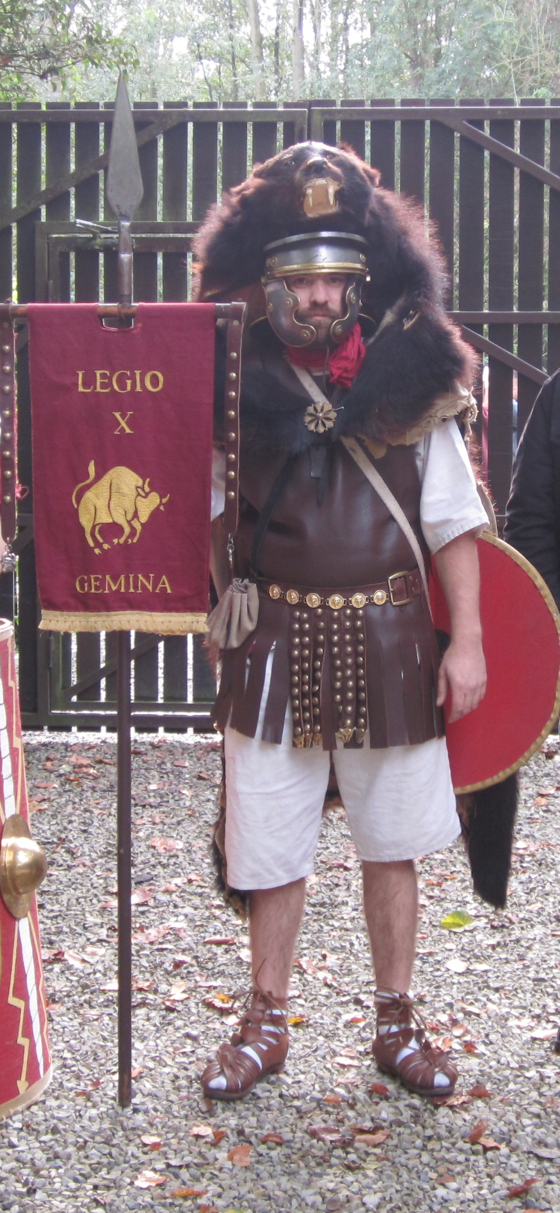 Op de afbeelding zie je een Romeins soldaat die een standaard draagt van het tiende legioen.